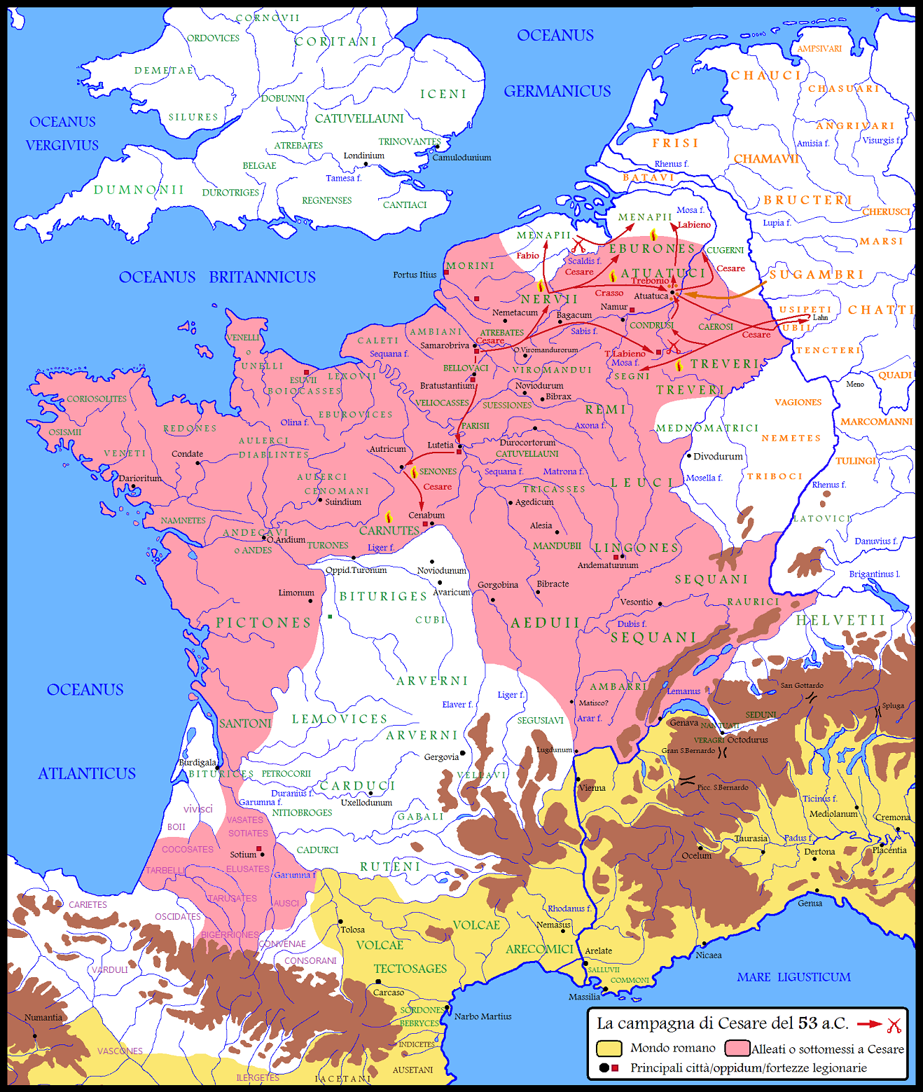 La Gallia nel corso del sesto anno di campagne militari di Cesare